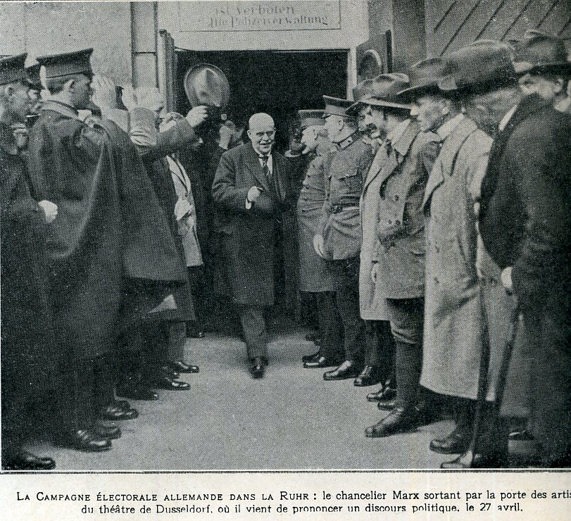 Campagne électorale du chancelier Marx